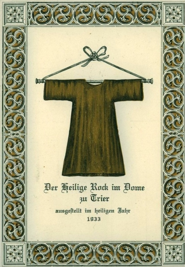 Heiliger Rock in Trier 1933